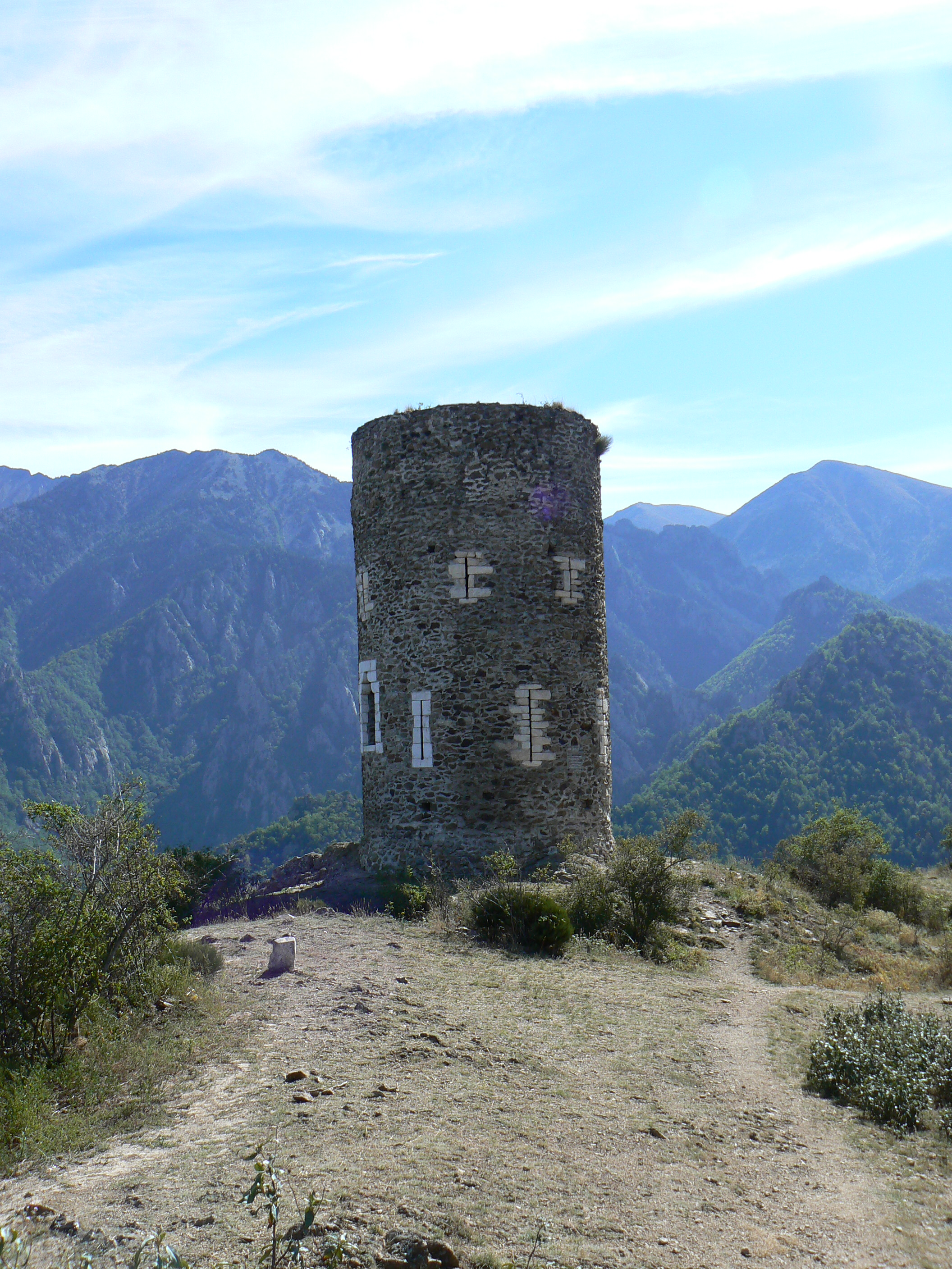 Tour de Goa (Sahorre, Pyrénées-Orientales, France).